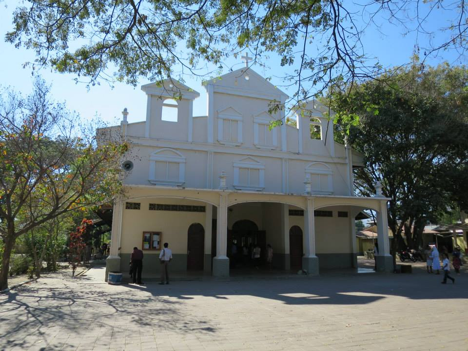 Kirche von Aimutin, Comoro, Dili. Die Kirche wurde wenige Jahre später für einen Neubau abgerissen.